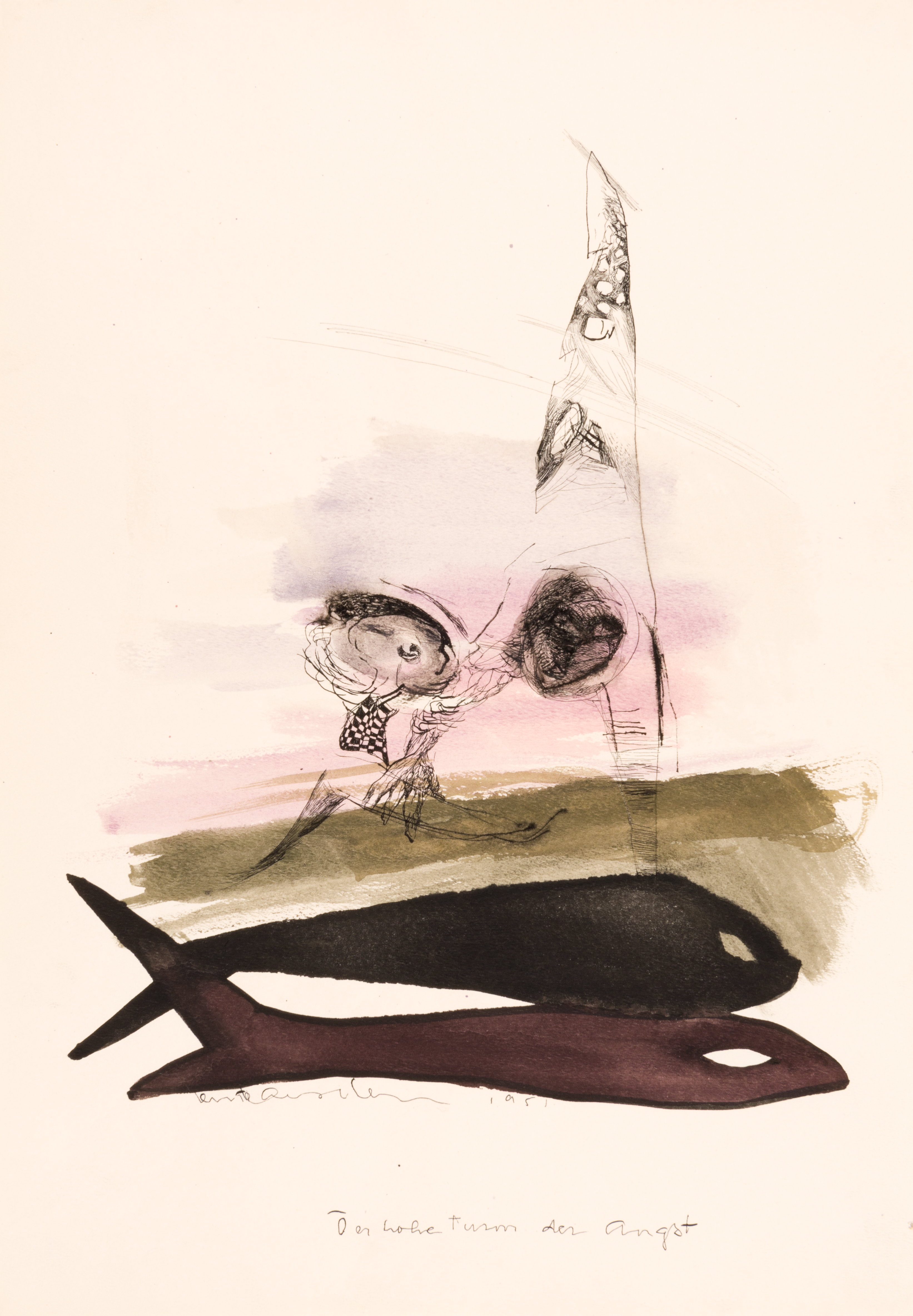 Zeichnung